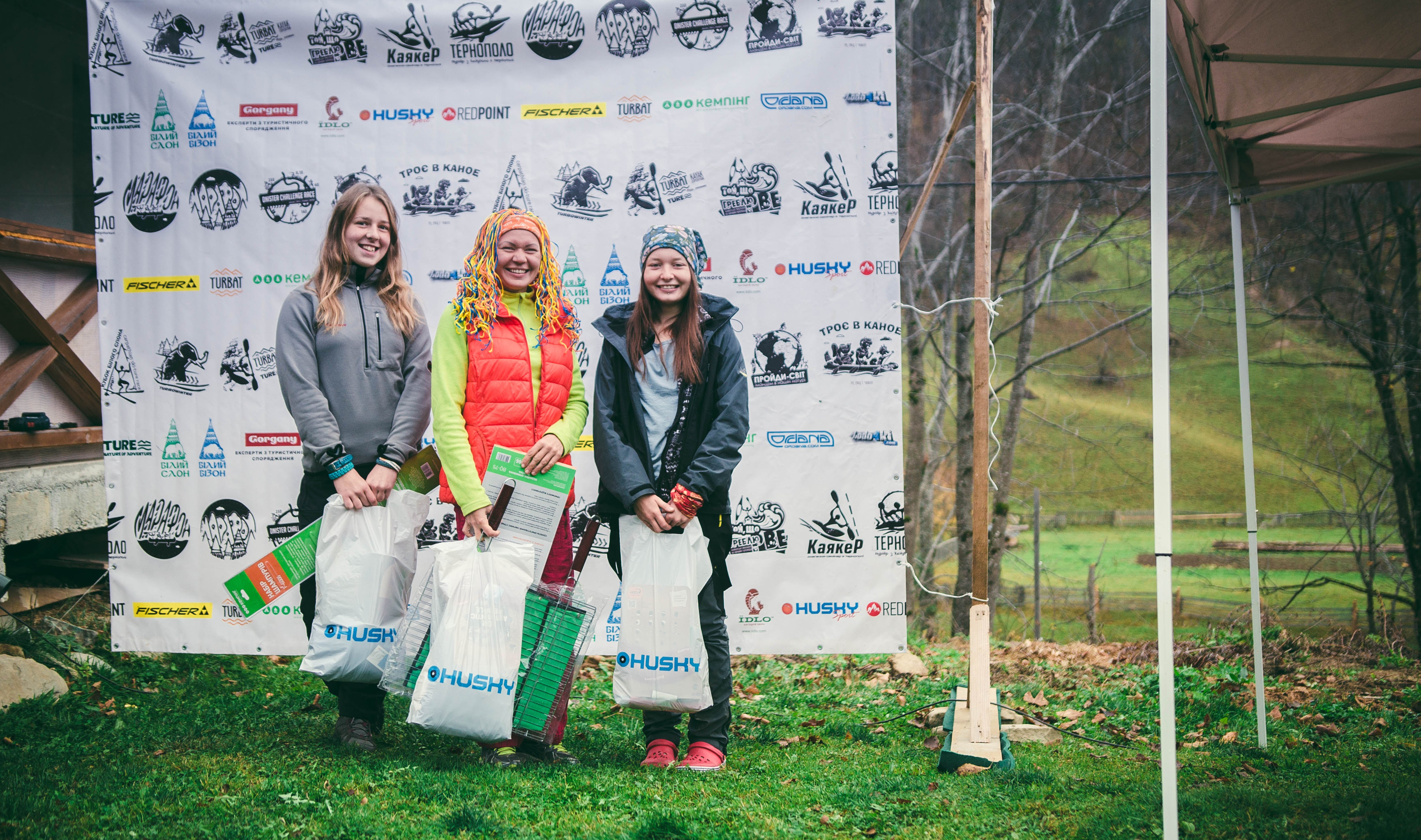 Переможниці Осіннього нічного чорногірського марафону 2017 у категорії "Жінки". Зліва направо: Мисишин Анна (ІІ місце), Юрасова Юлія (І місце), Мархевка Юлія (ІІІ місце). Після нагородження у кемпі "Білий Слон", що у с. Дземброня (місце фінішу марафону).